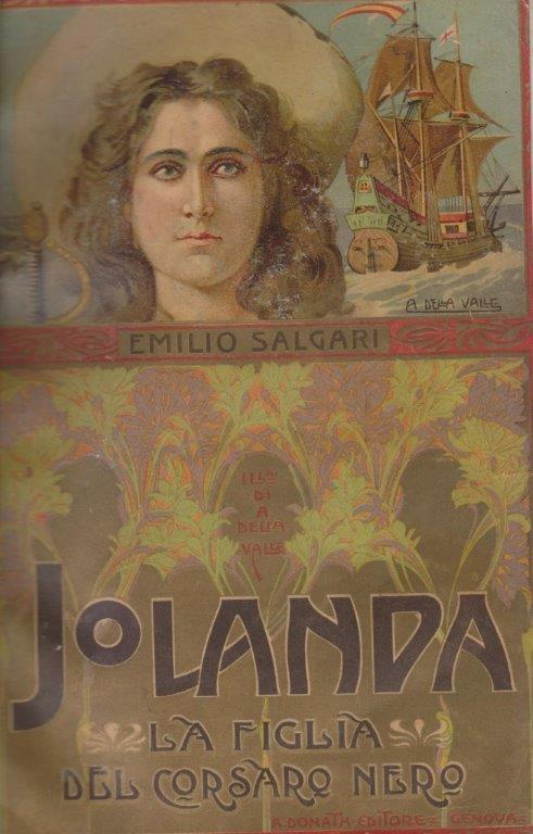 Copertina del romanzo Jolanda, la figlia del Corsaro Nero, 1a edizione Donath 1905. Illustrazione di Alberto della Valle.